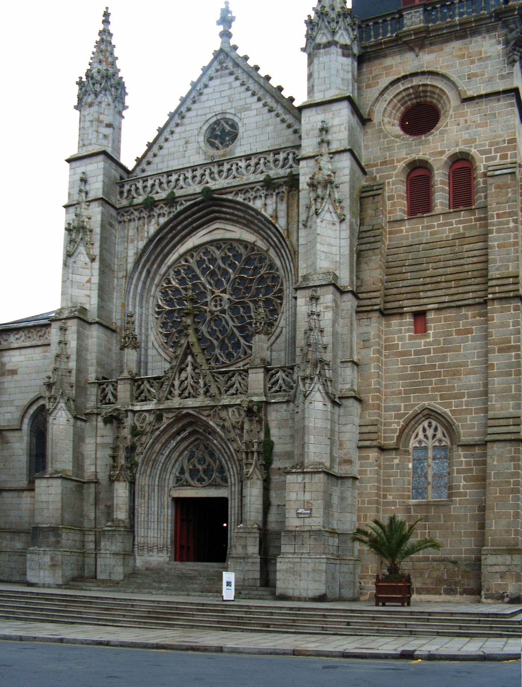 Fougères - Kirche Saínt Léonard